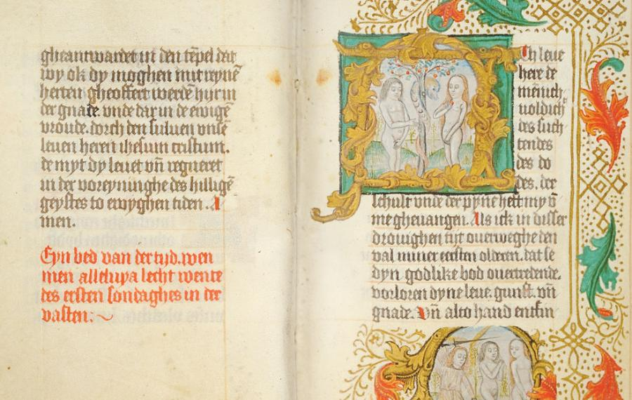 Ausschnitt einer Doppelseite aus dem Stundenbuch des Lübecker Patriziers Johann Luneborch (1492). Stundenbuch des Hans Luneborch im Handschriftencensus, Libr. of the Peabody Institute, Ms. 1.